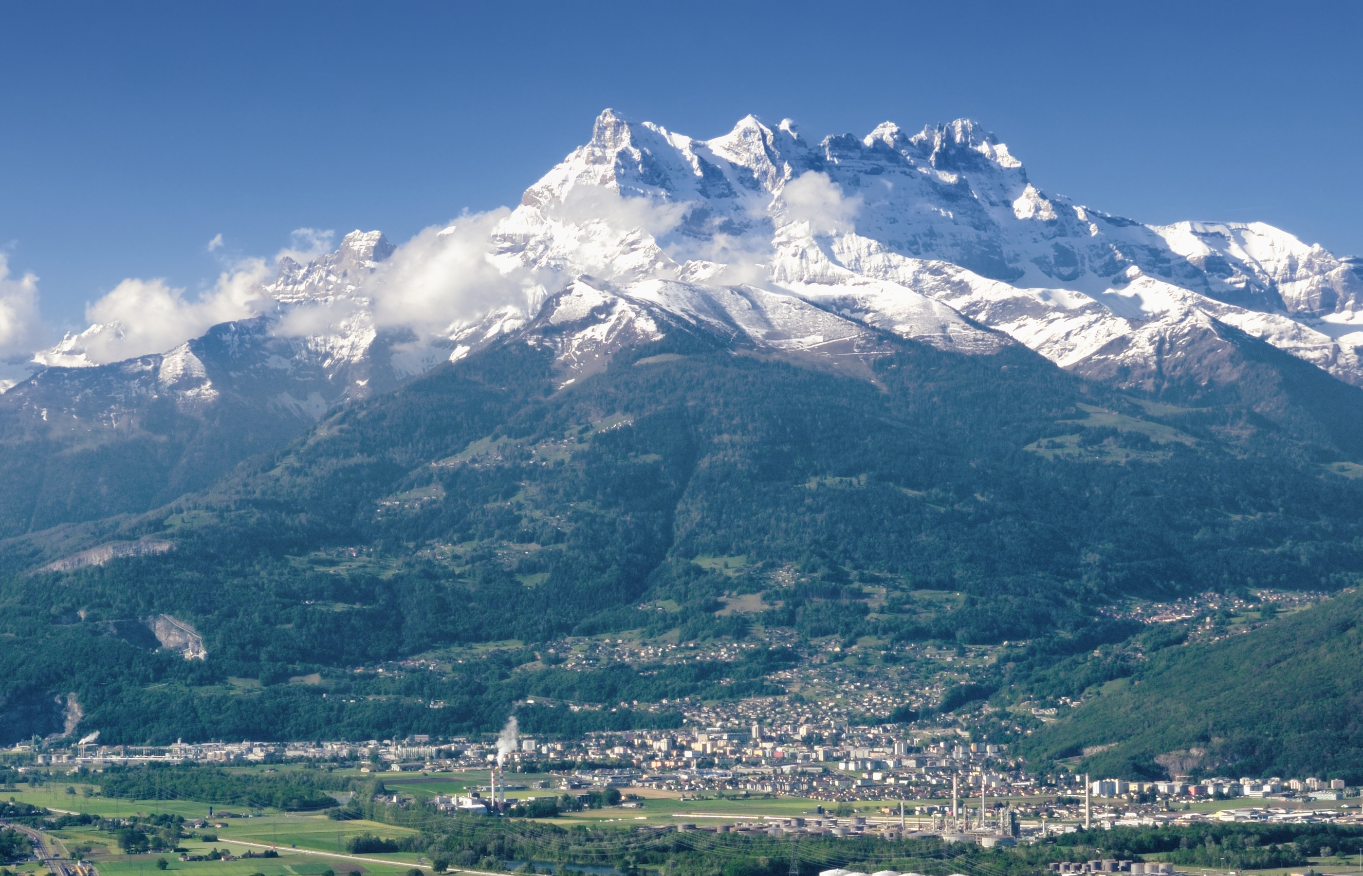 La région de Monthey et les Dents du Midi.